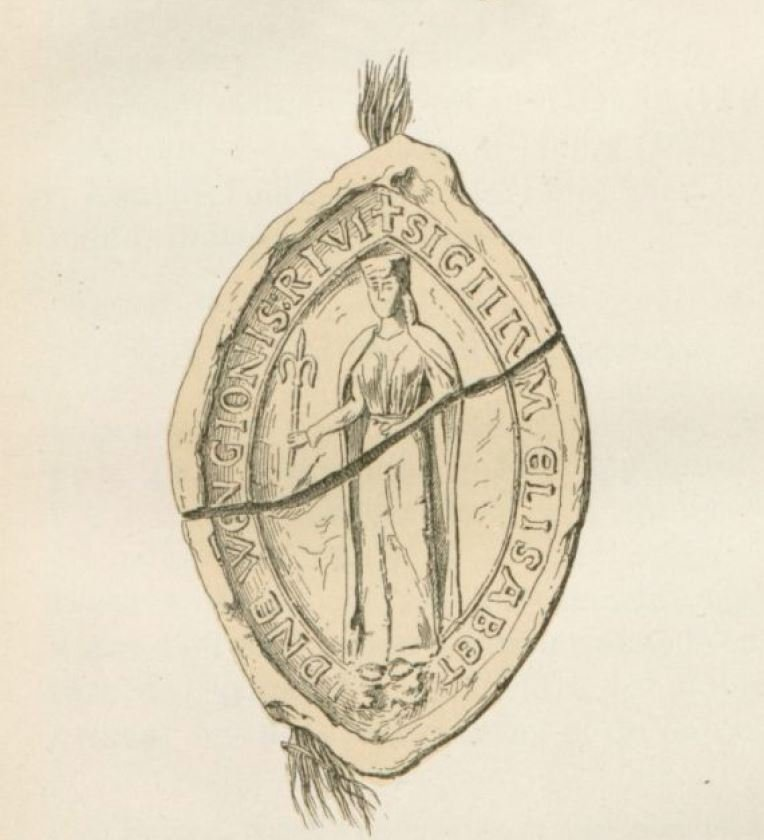 Sceau d'Elisabeth de Laferté-sur-Amance, par Jules d'Arbaumont dans le Cartulaire du Prieuré de Saint-Etienne de Vignory (1882).